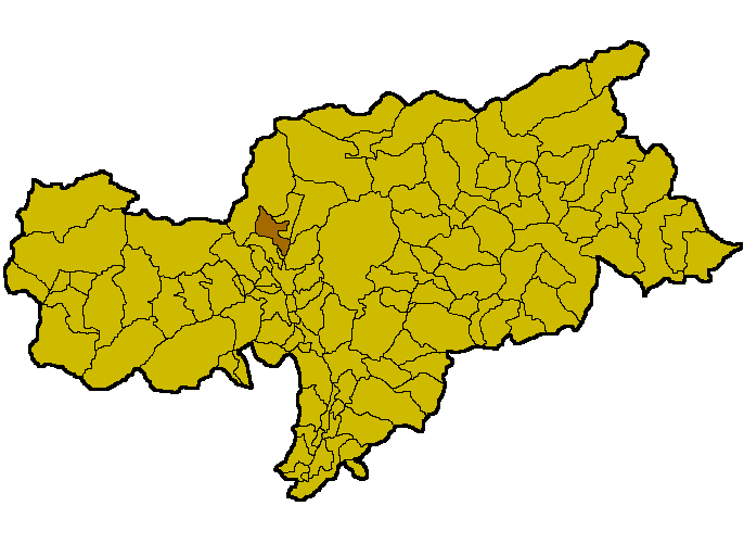 Situo de Rifiano en Sudtirolo.